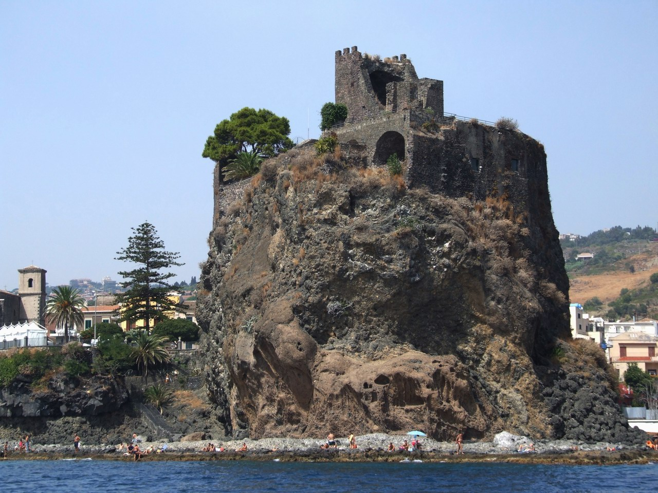 Aci Castello